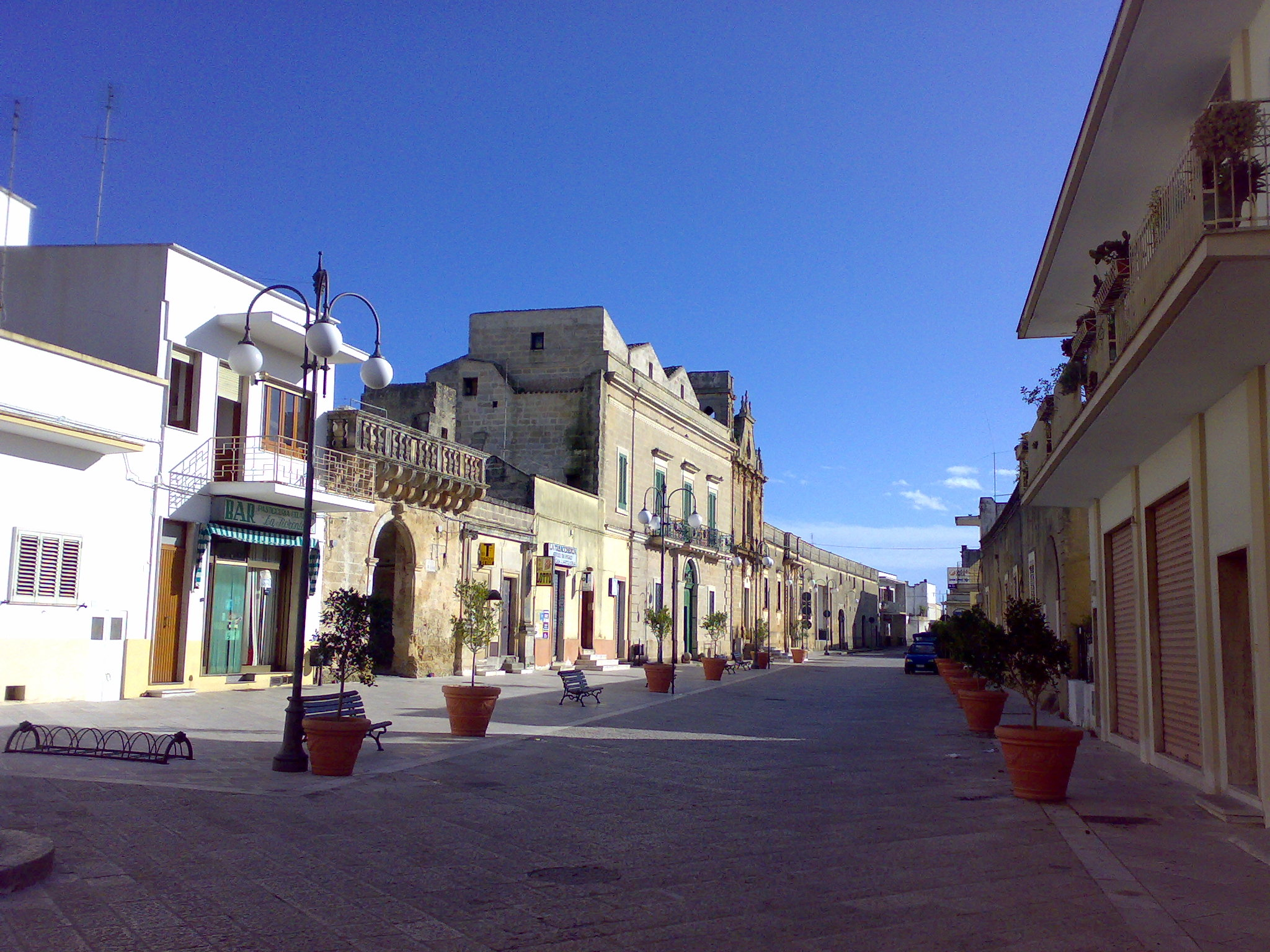 Piazza di Montesano Salentino